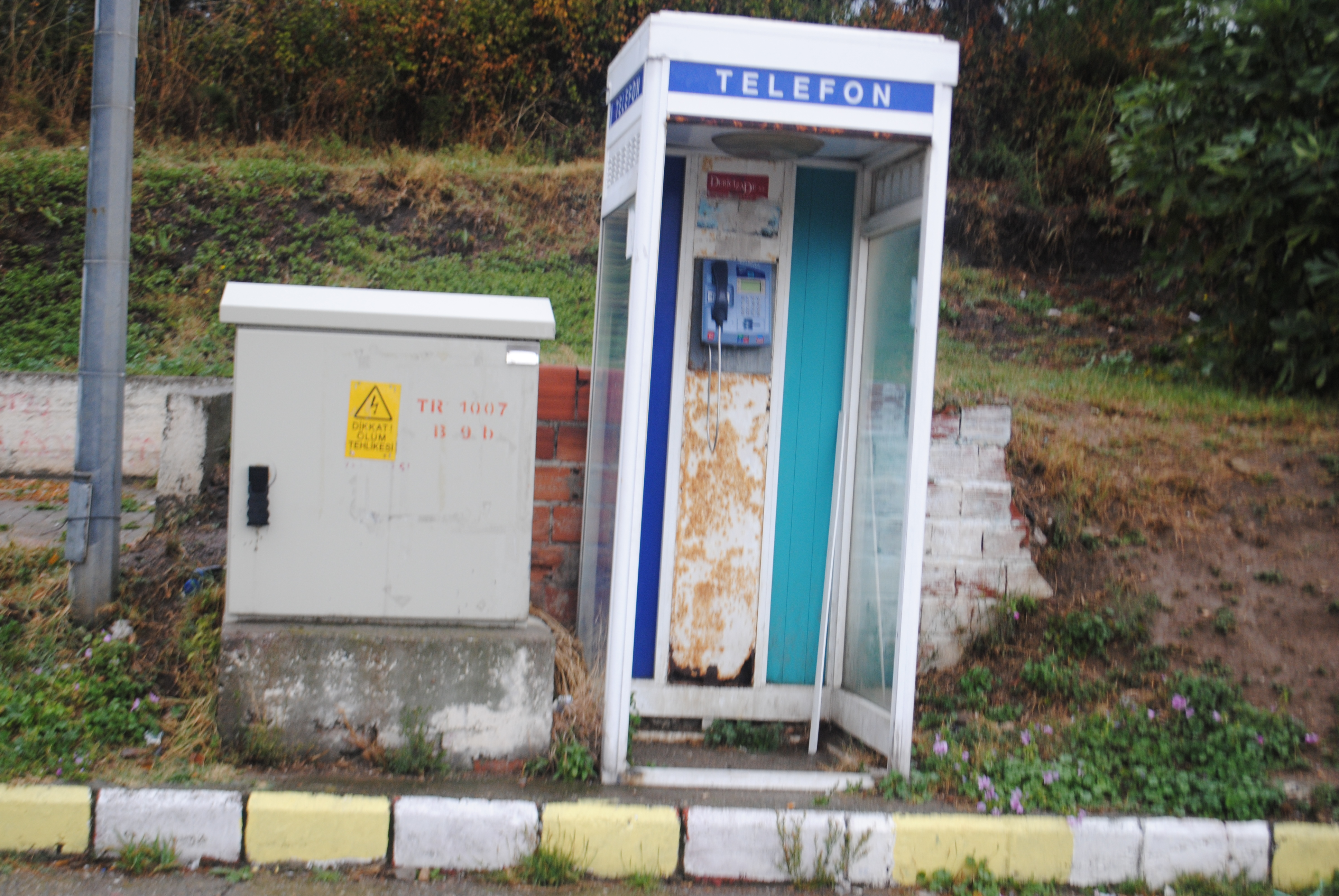 Amasra'dan çeşitli görüntüler